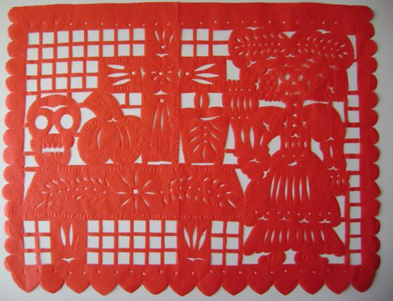 ejemplo de papel picado